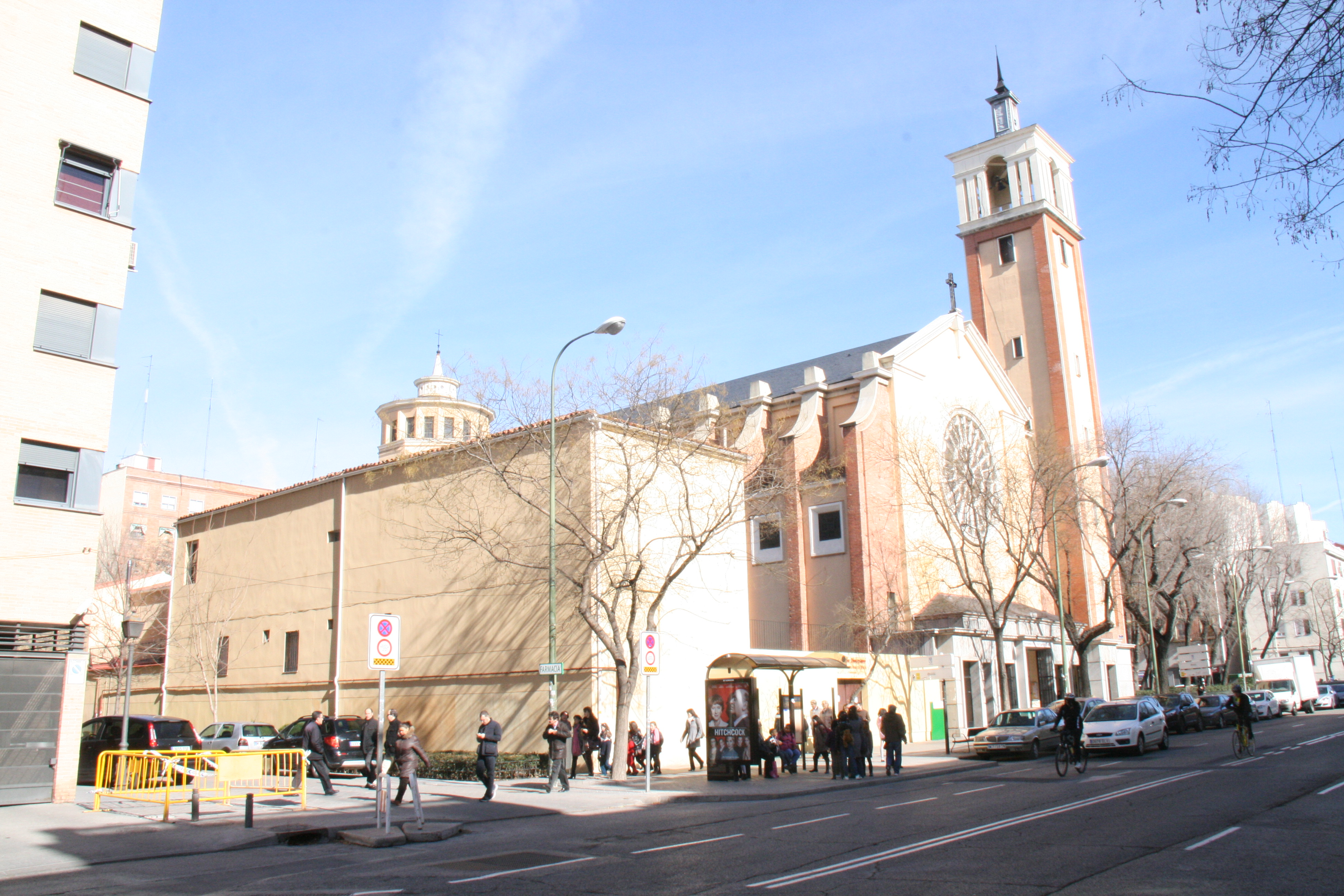 Parroquia Beata María Ana de Jesús